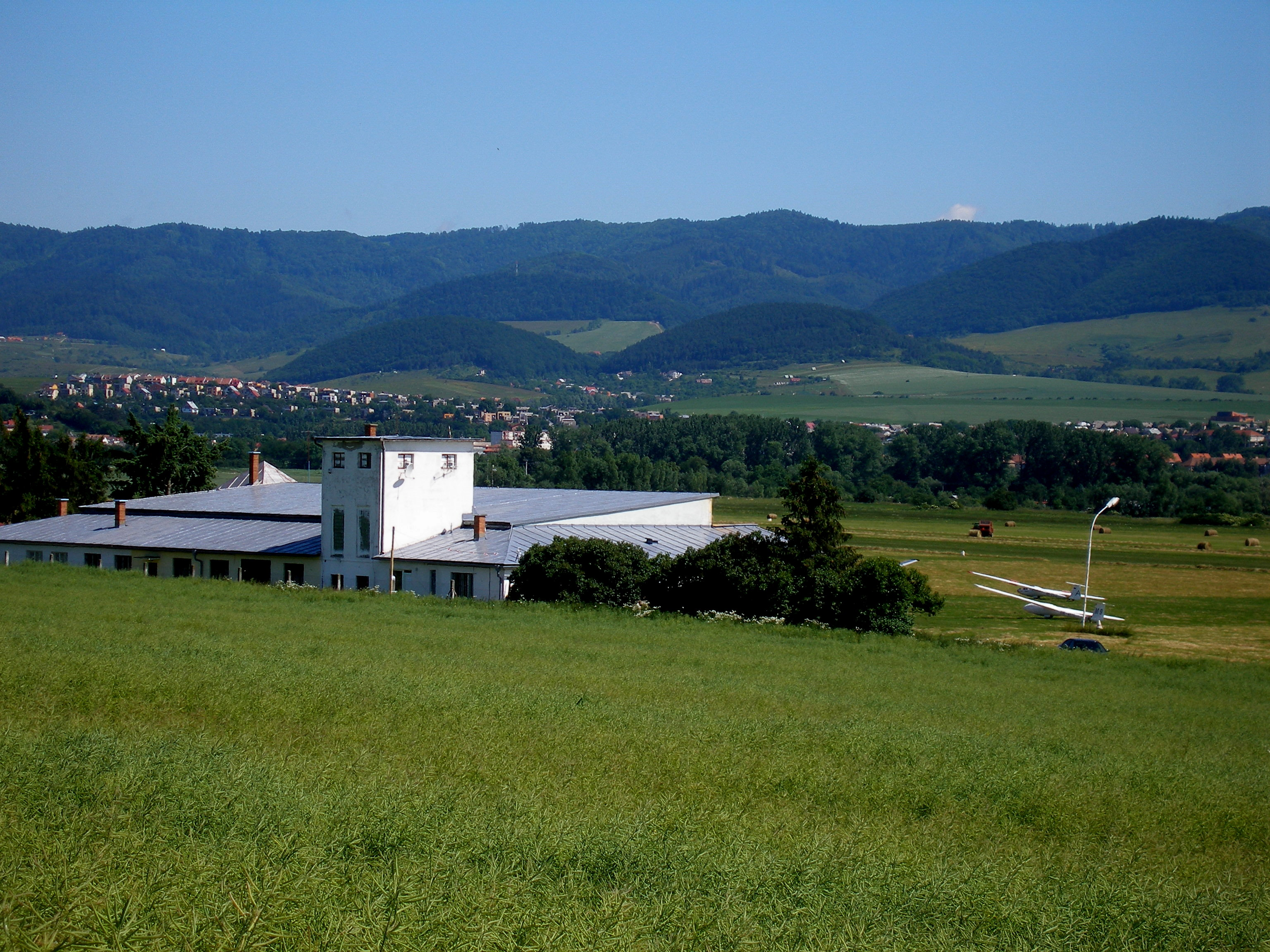 Obec Ražňany okres Sabinov. V popredí areál športového letiska